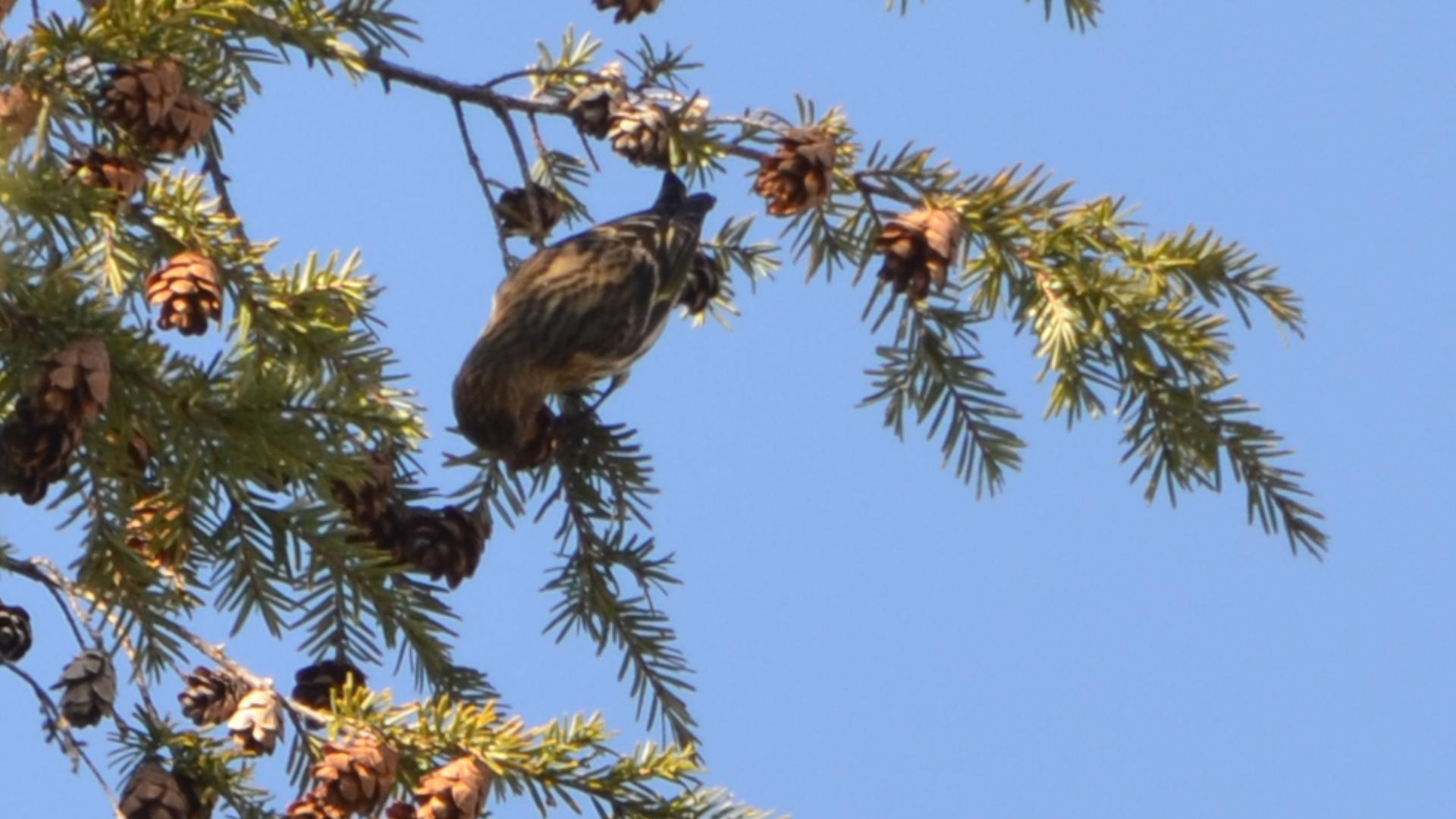 Carondelet Park, St. Louis MO on 11/16/12